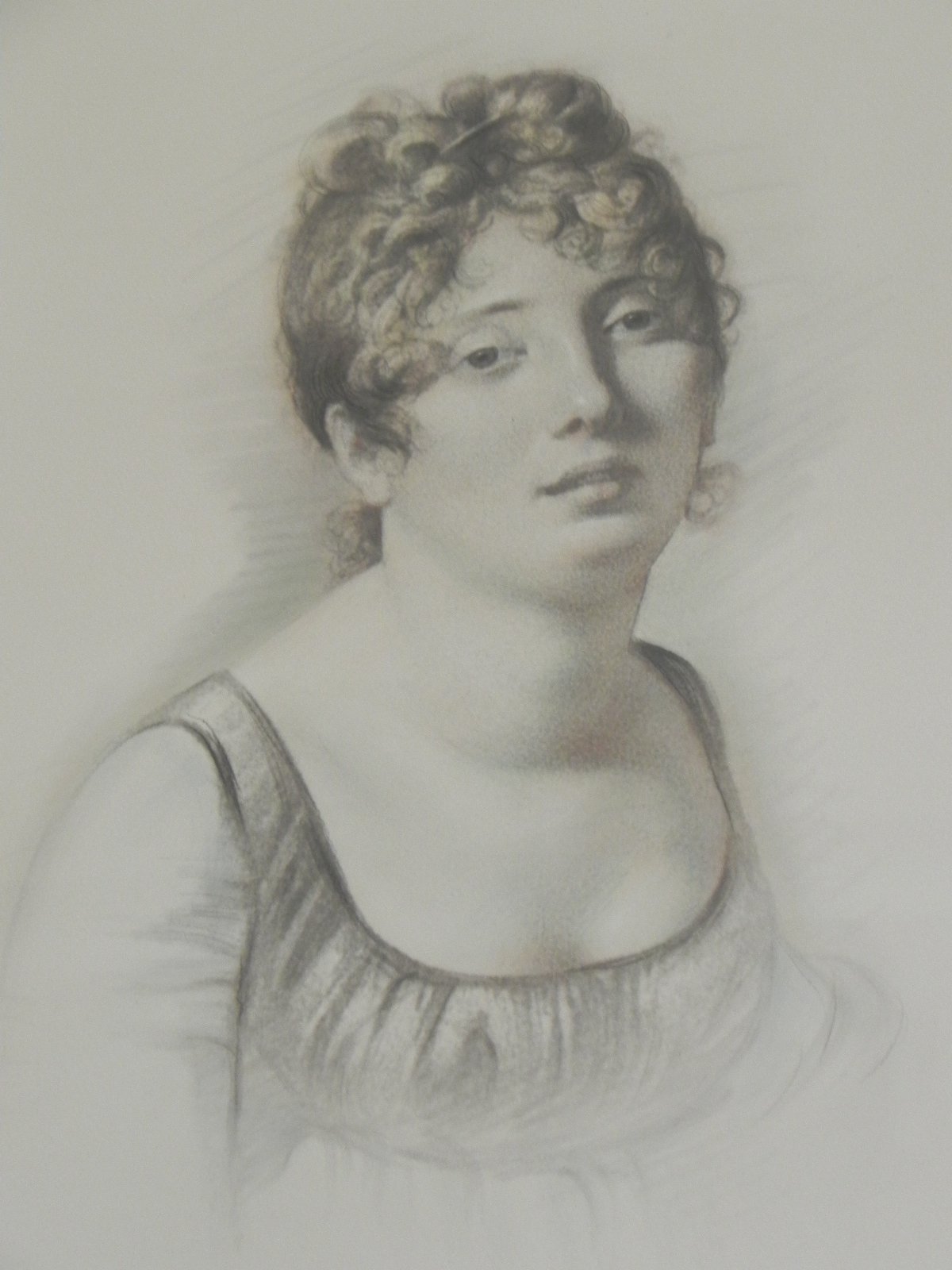 Aglaé Adanson